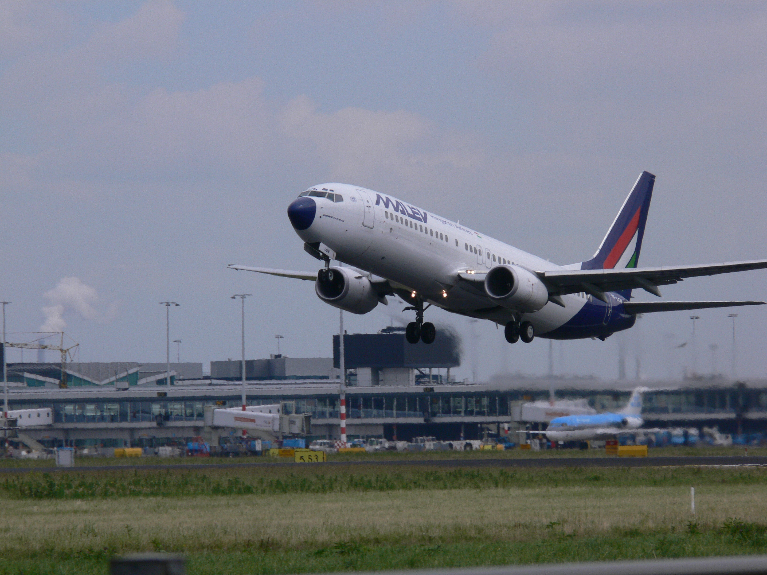 Letadlo Maďarských aerolinií (Malev) při startu